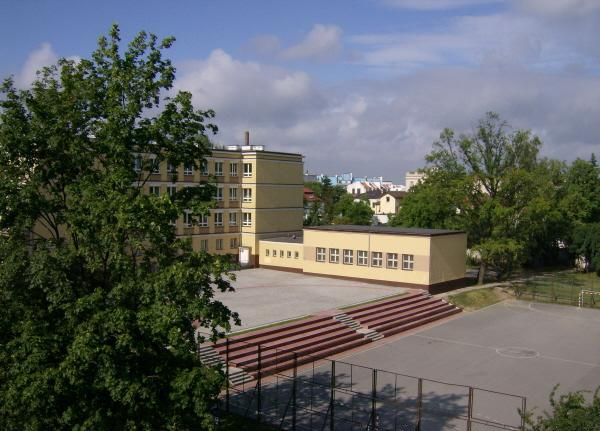 Szkoła Podstawowa nr 13. im. Władysława Jagiełły oraz Gimnazjum nr 2. przy ul. Prostej 27a. Widok od strony os. Jana Czarnockiego. Widok od strony os. Jana Czarnockiego teraz nastąpiła zmiana nazwy szkoły na Zespół Szkół Podstawowych i Gimnazjalnych nr 27 w Kielcach